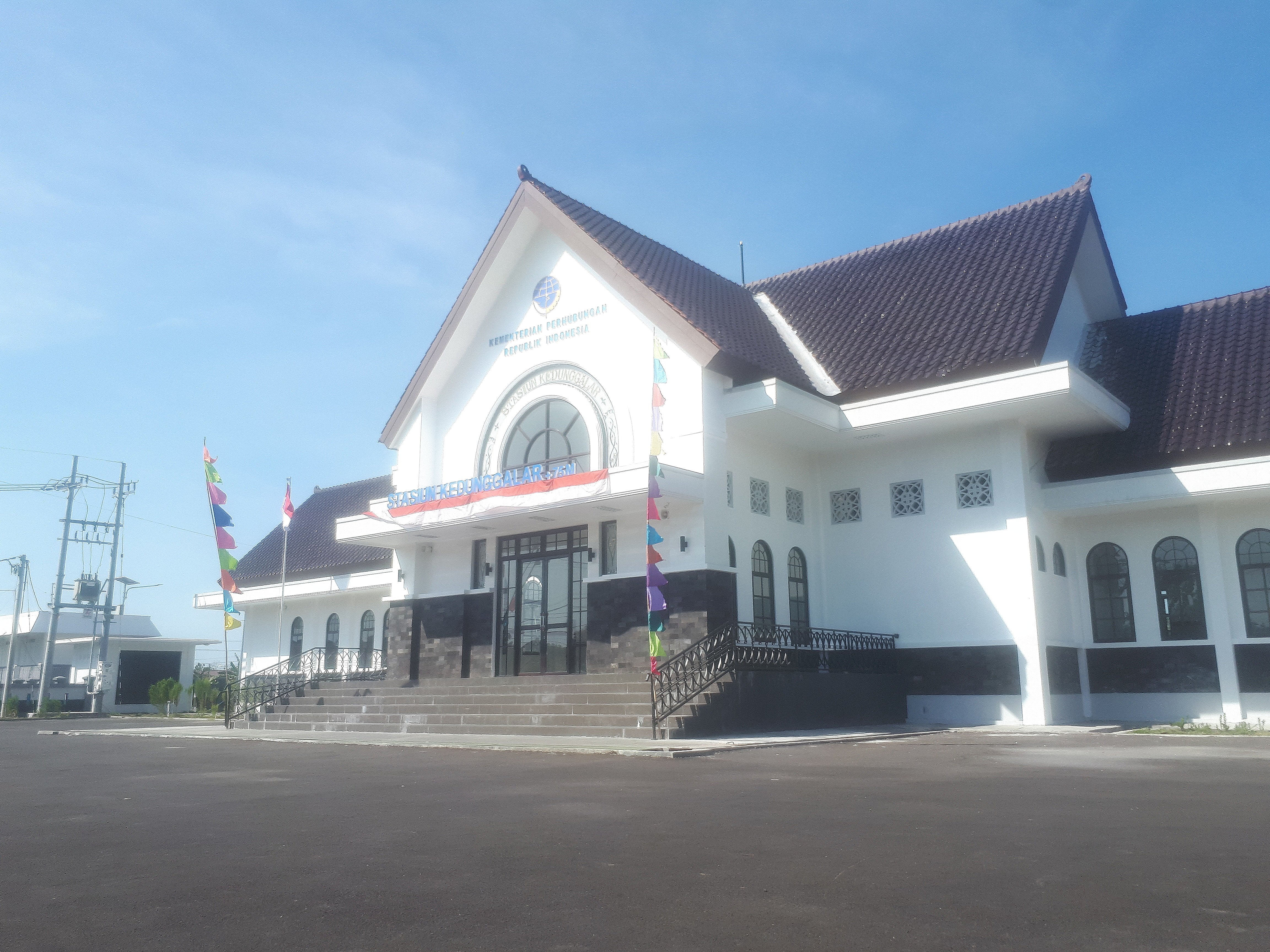 Bangunan Stasiun Kedunggalar baru yang beroperasi seiring pengoperasian jalur ganda lintas Kedungbanteng-Geneng